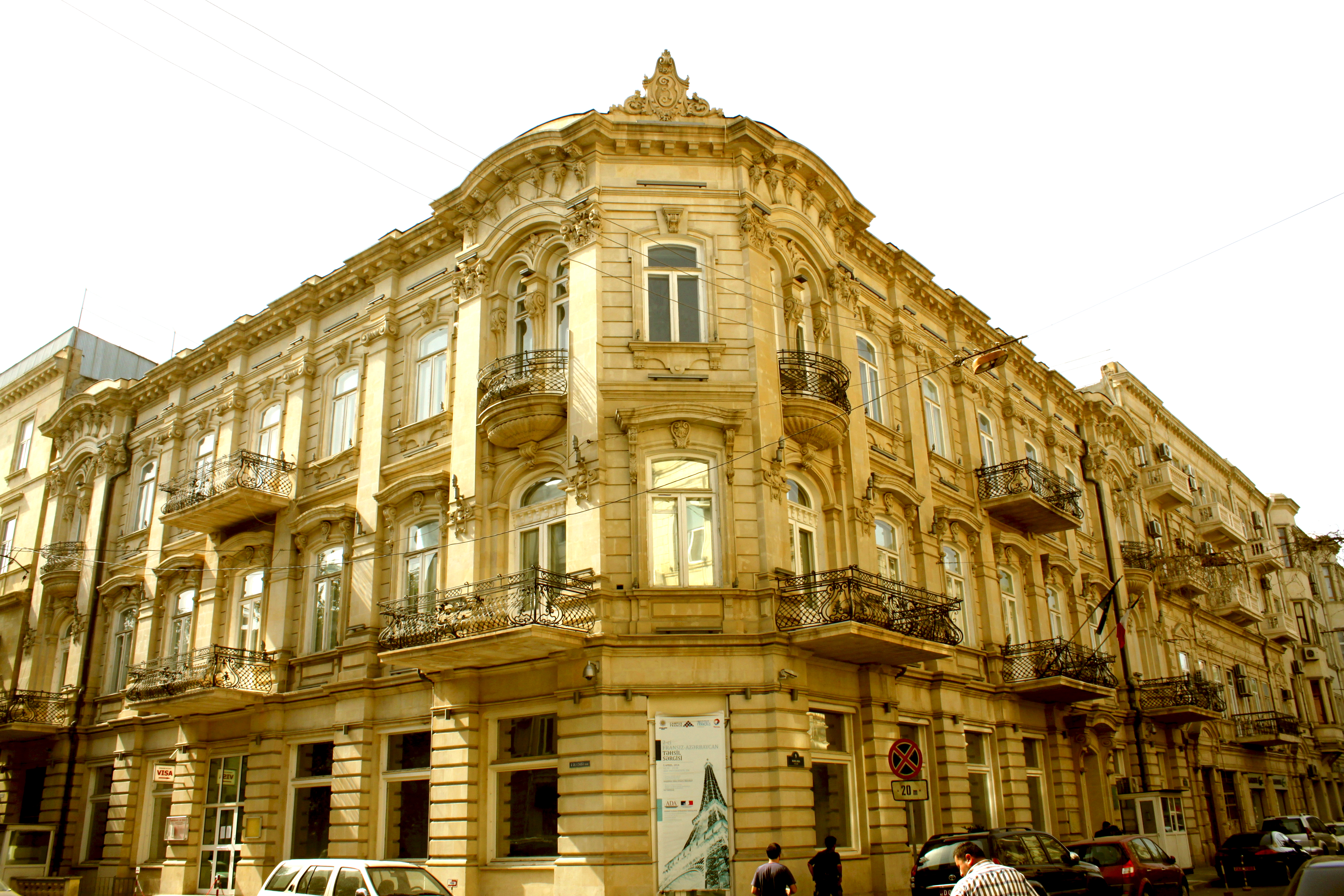 Fransa səfirliyinin binası, R.Rza 11